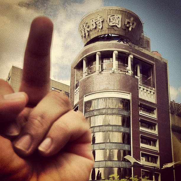 中文（台灣）: 遭反媒體壟斷運動鄙視的原《中國時報》大樓。